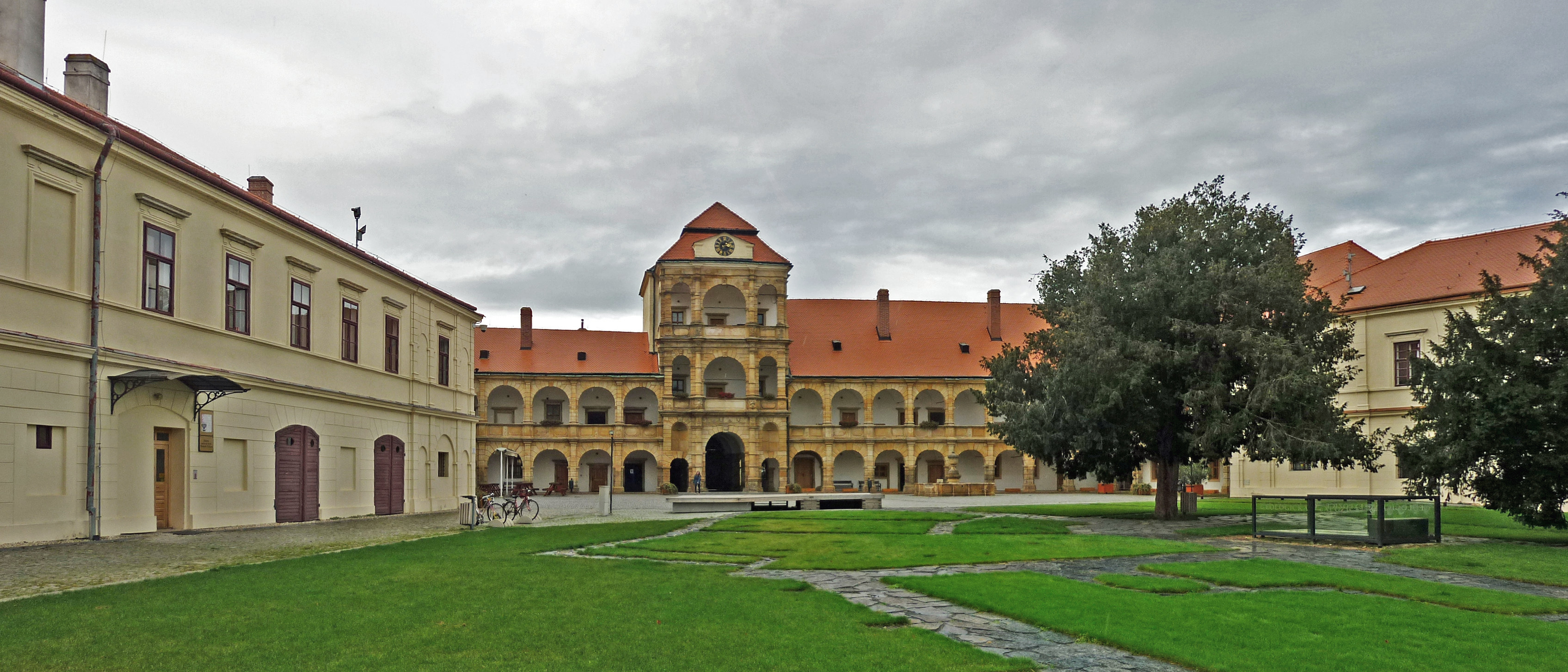 Schloss in Mährisch Trübau (Moravská Třebová)